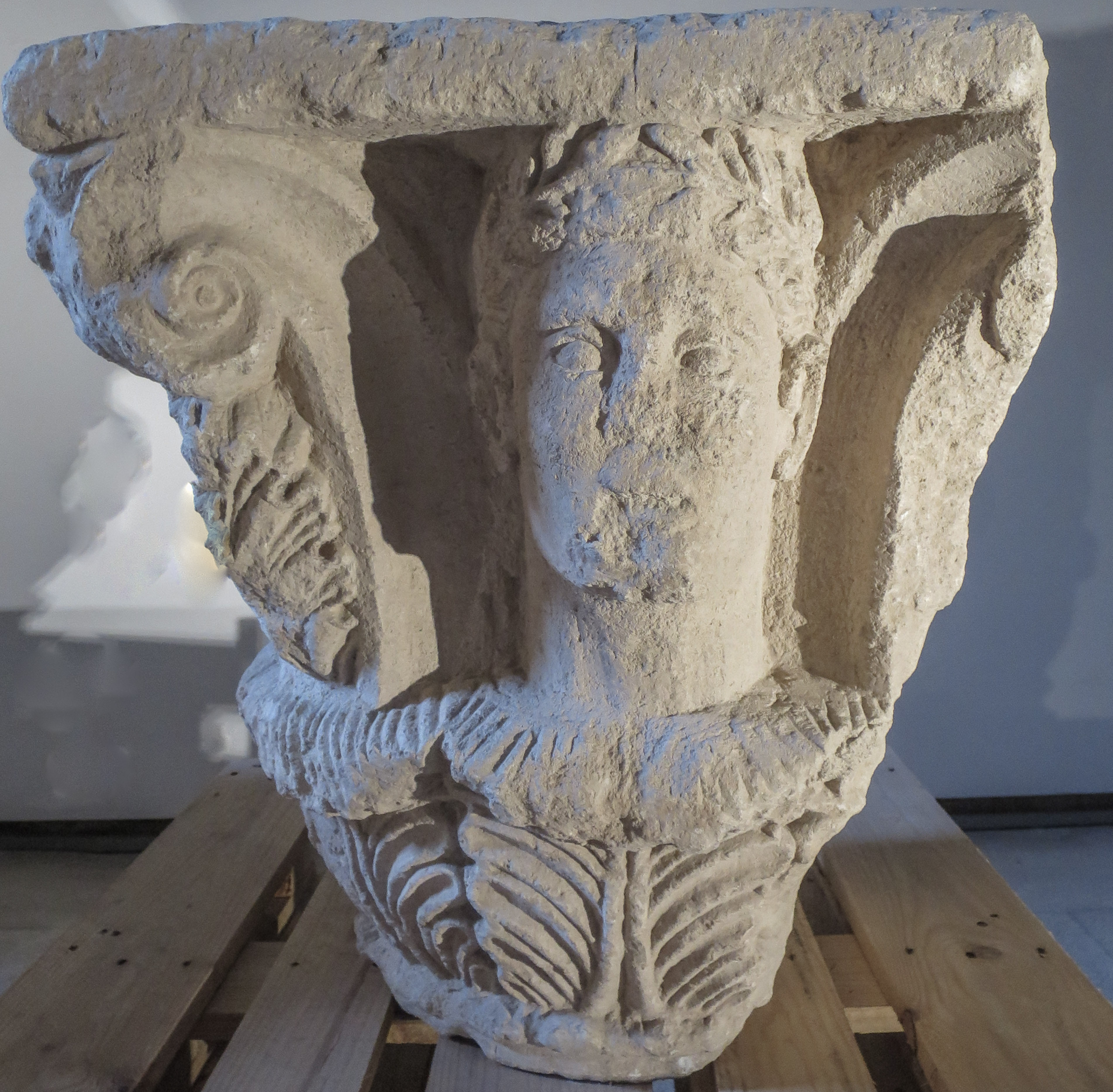 Kapitell aus Glanum im archäologischen Museum im Hôtel de Sade in Saint-Rémy-de-Provence